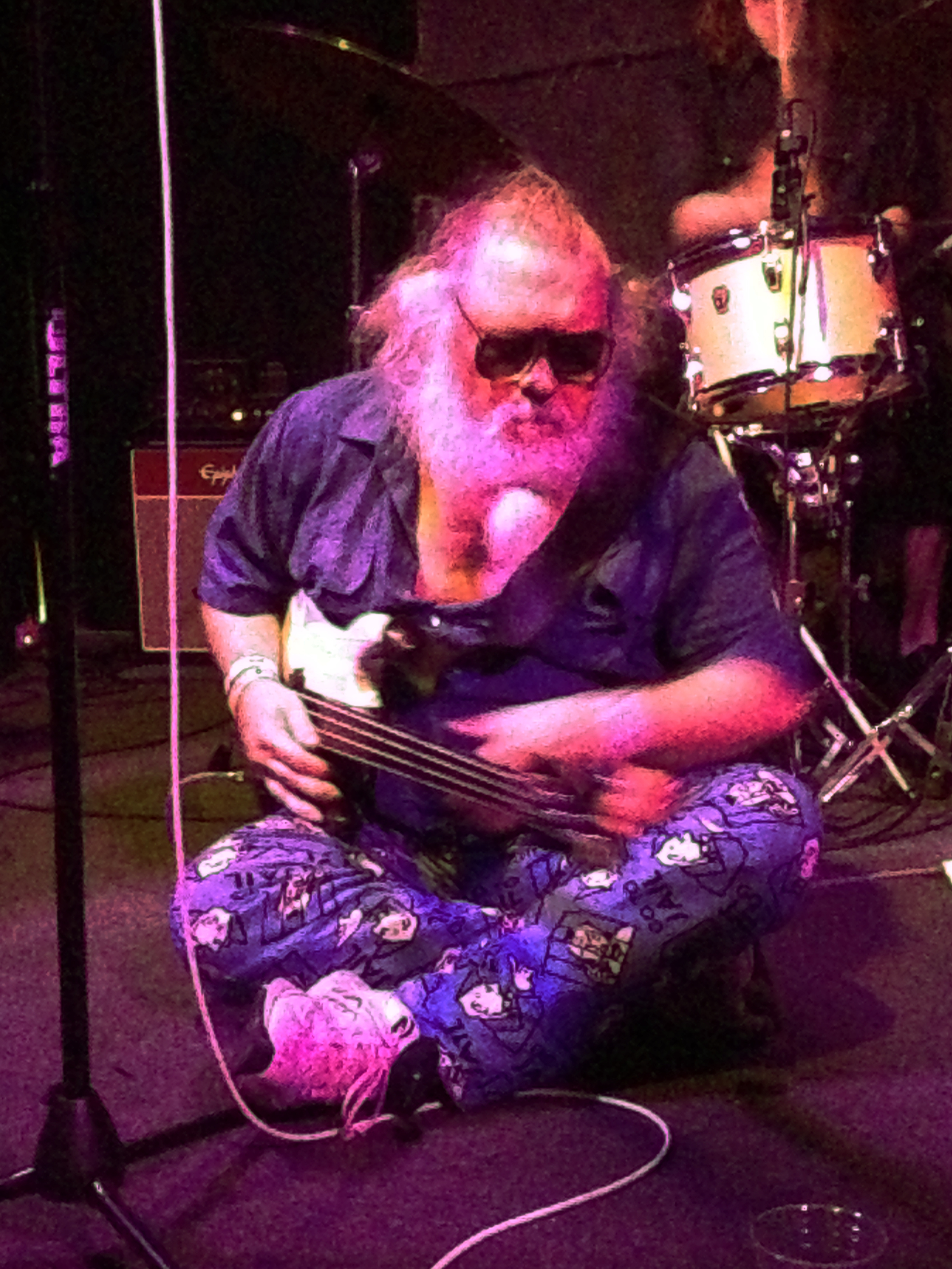 R Stevie Moore, Glasslands, Brooklyn, New York, 16 April 2013